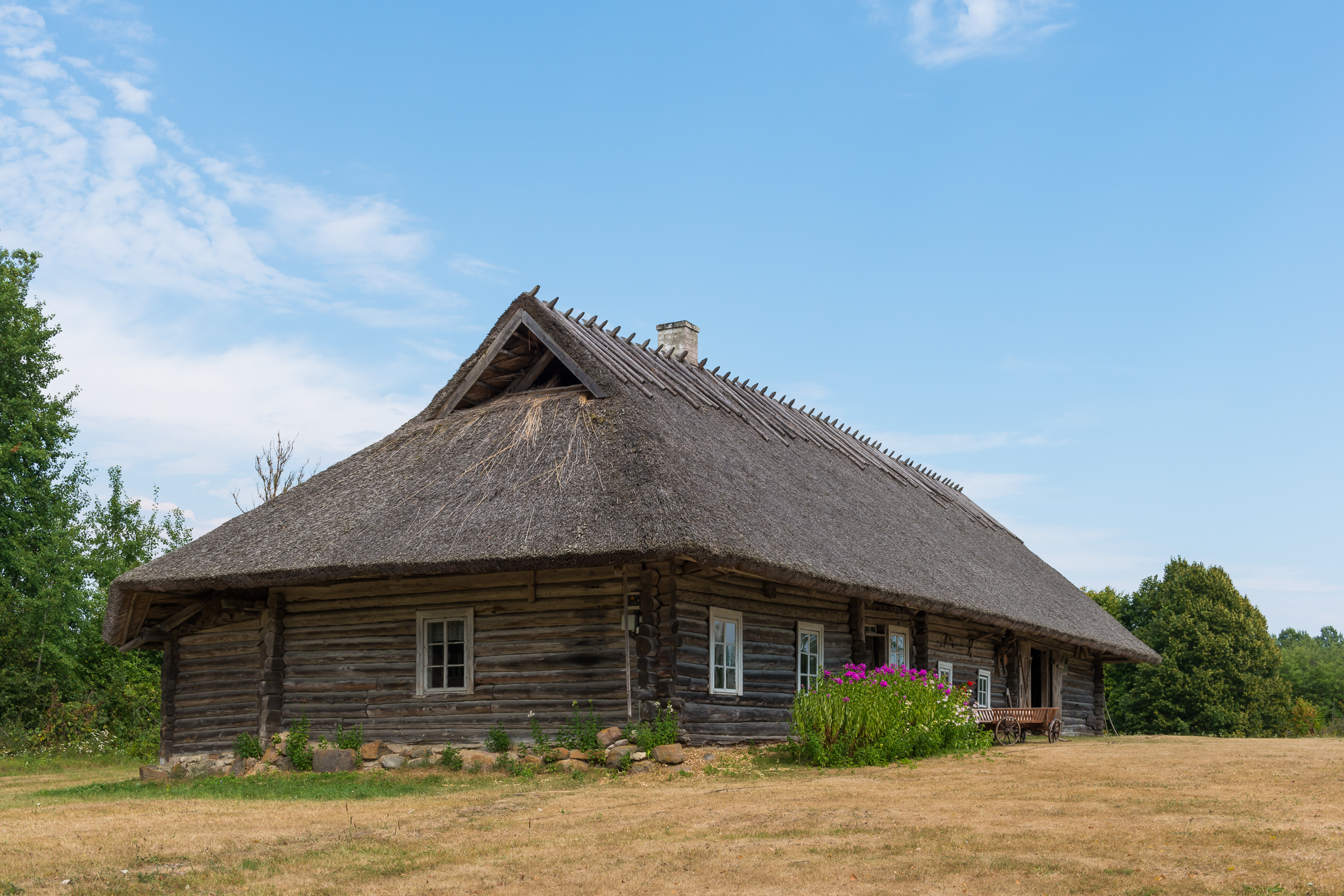 Soera talu elamu Hiiumaal